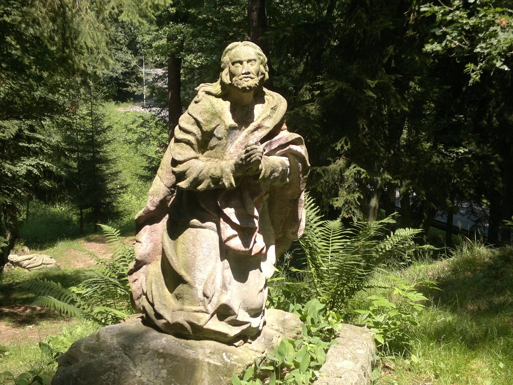 Křížová cesta - 25 zastavení (Římov), Dolní Římov, Římov